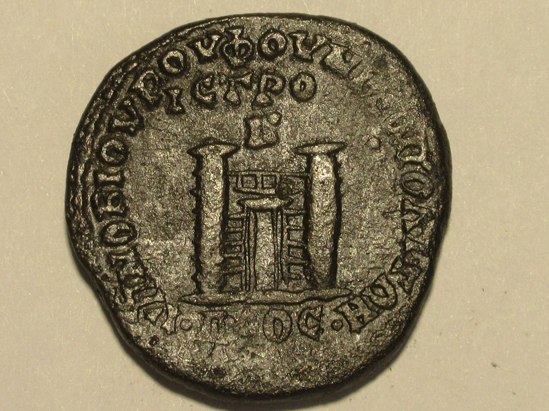 Stadttor von Nicopolis ad Istrum auf Münze z.Zt. Kaiser Elagabalus, Varbanov 3139 var